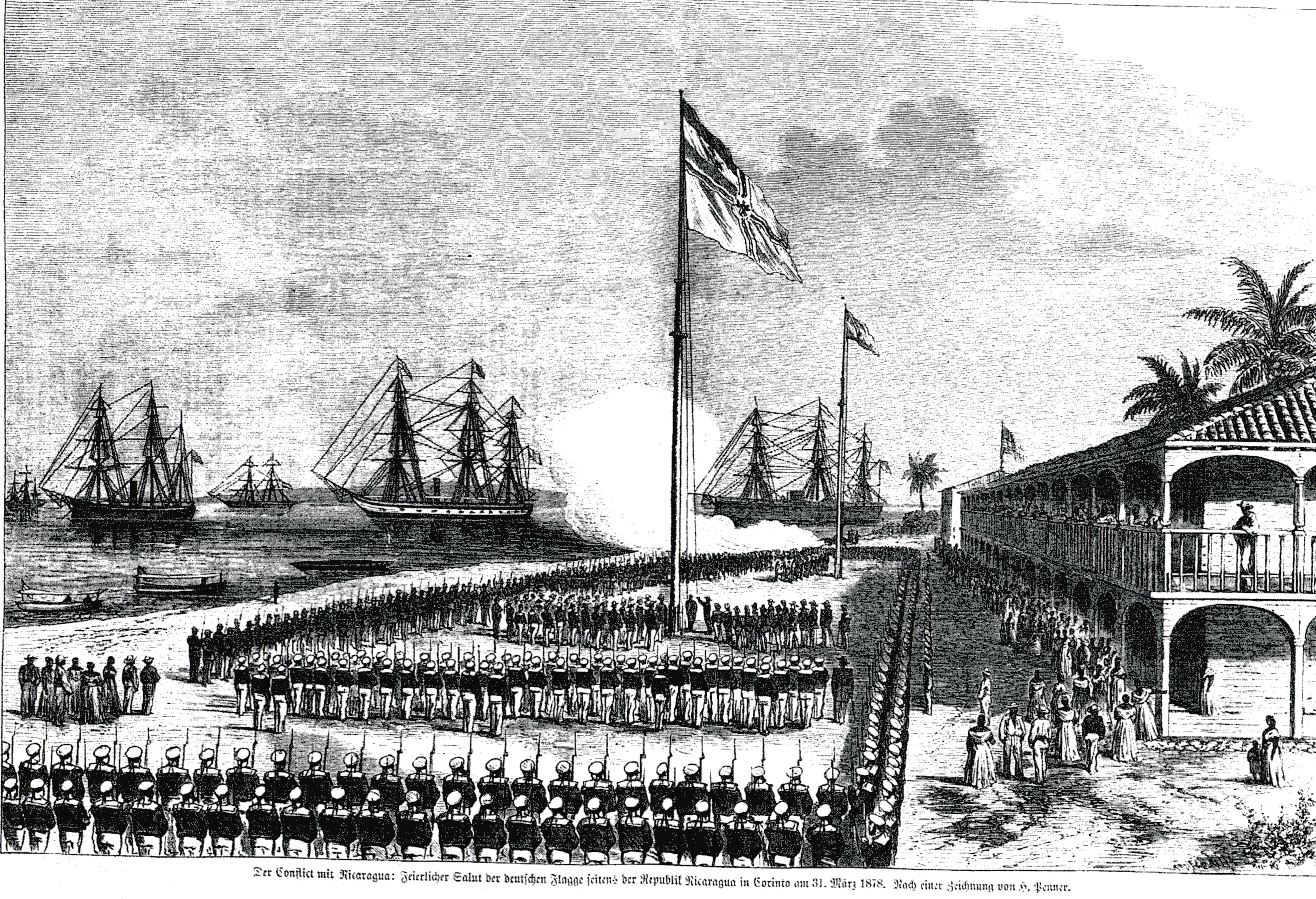 Salut der Reichskriegsflagge durch die nicaraguanischen Behörden, Corinto, Nicaragua, 31. März 1878. Im Hintergrund von links SMS ARIADNE, SMS ELISABETH und SMS LEIPZIG. Zeichnung von Hermann Penner (?-1894)